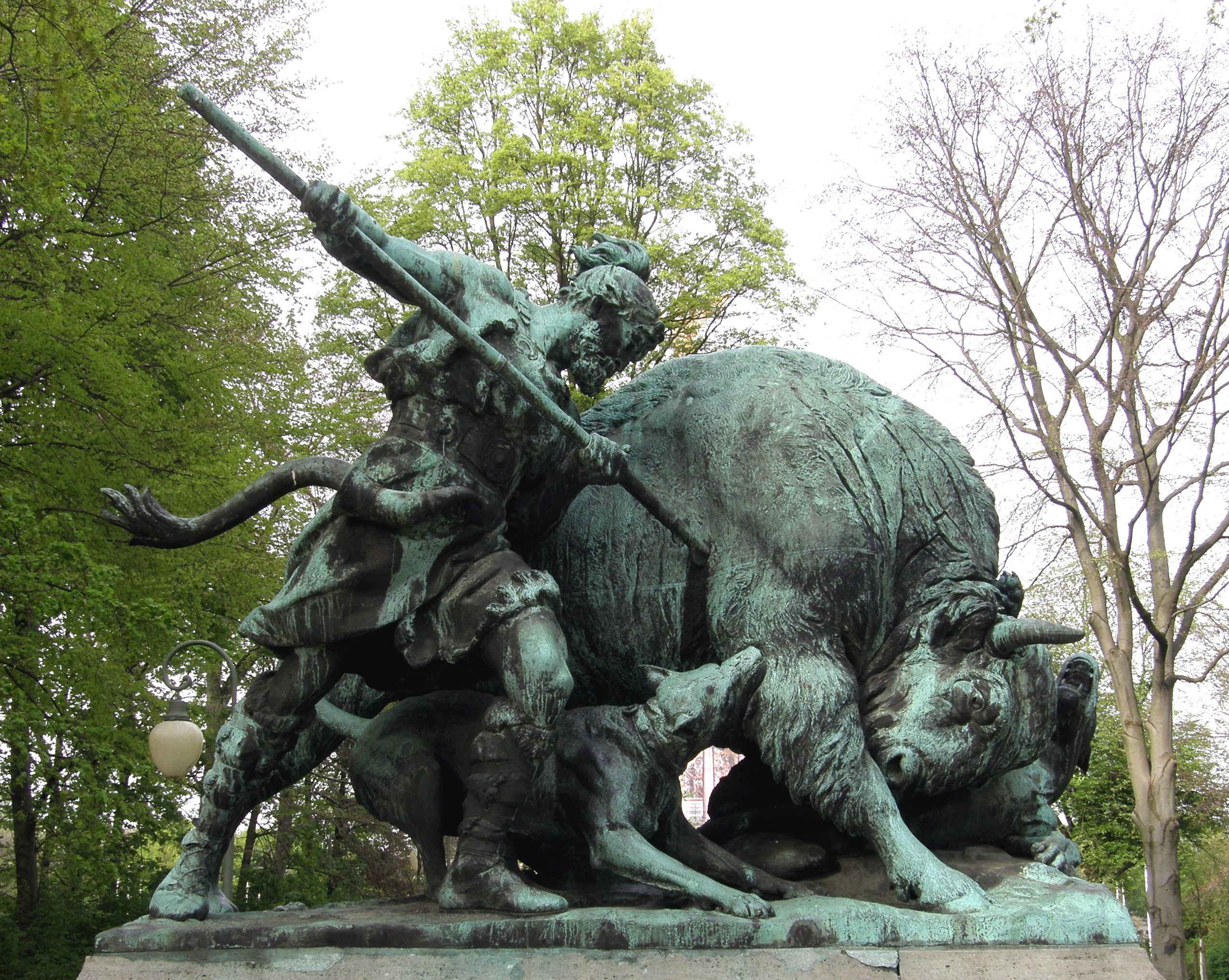 Skulptur Altgermanische Wisentjagd von Fritz Schaper, geschaffen 1903-04. Die Plastik gehört zu einem Ensemble von vier Skulpturen mit Jagdszenen.